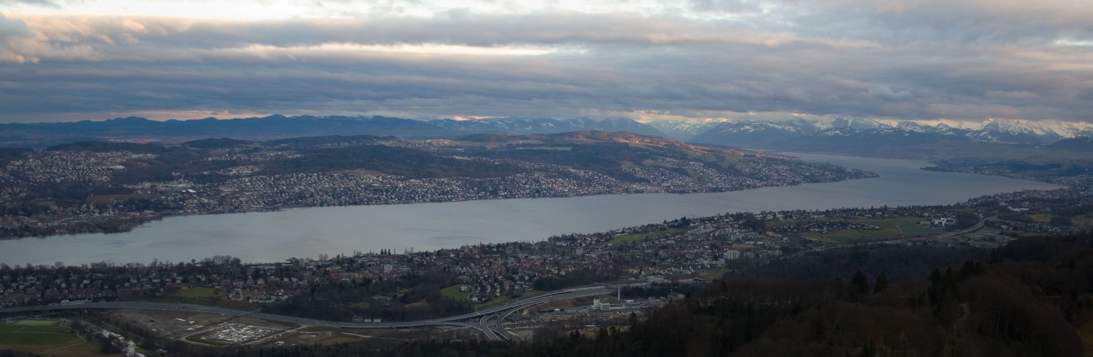 Lac de Zurich